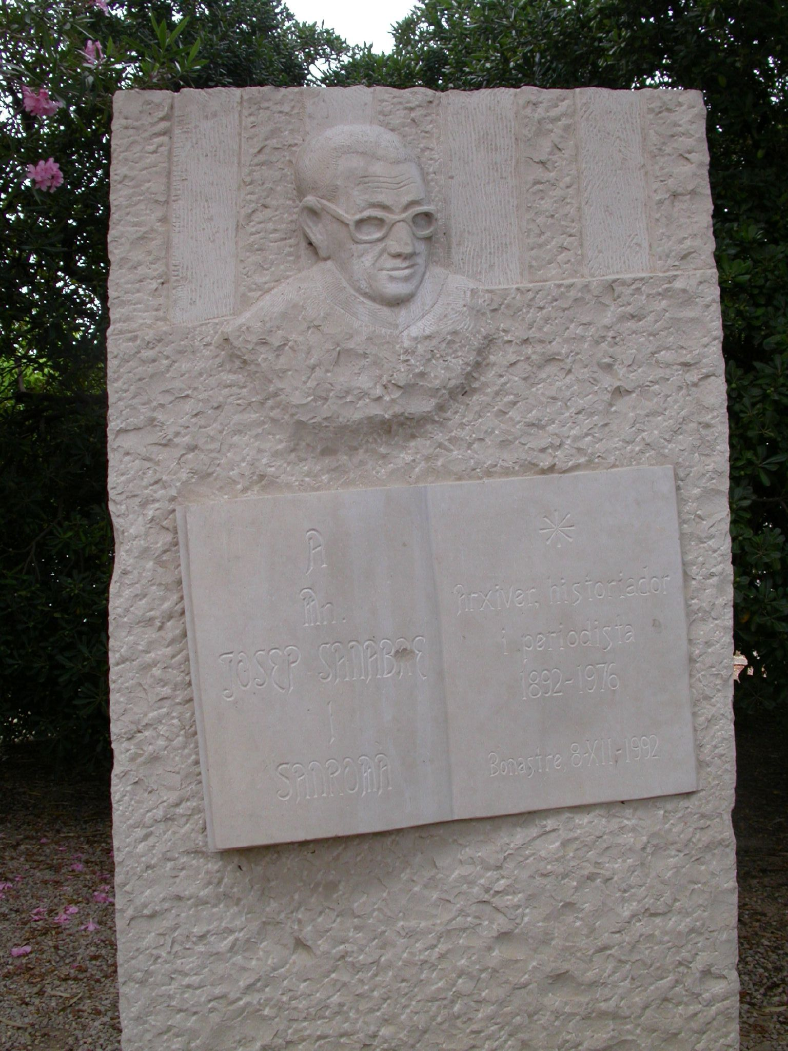 Josep Sanabre i Sanromà, prohom de Bonastre